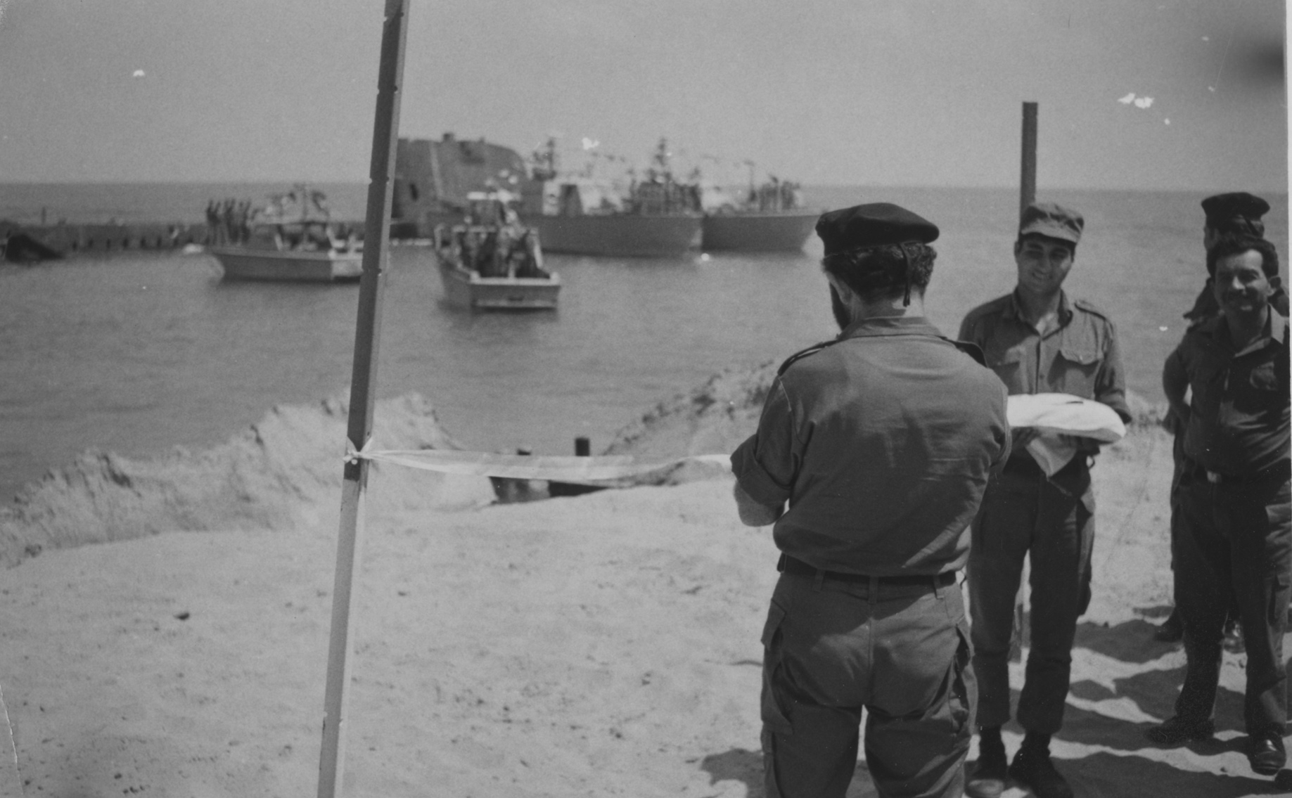 מפקד חיל הים האלוף מיכאל ברקאי בטקס פתיחת נמל דפנה